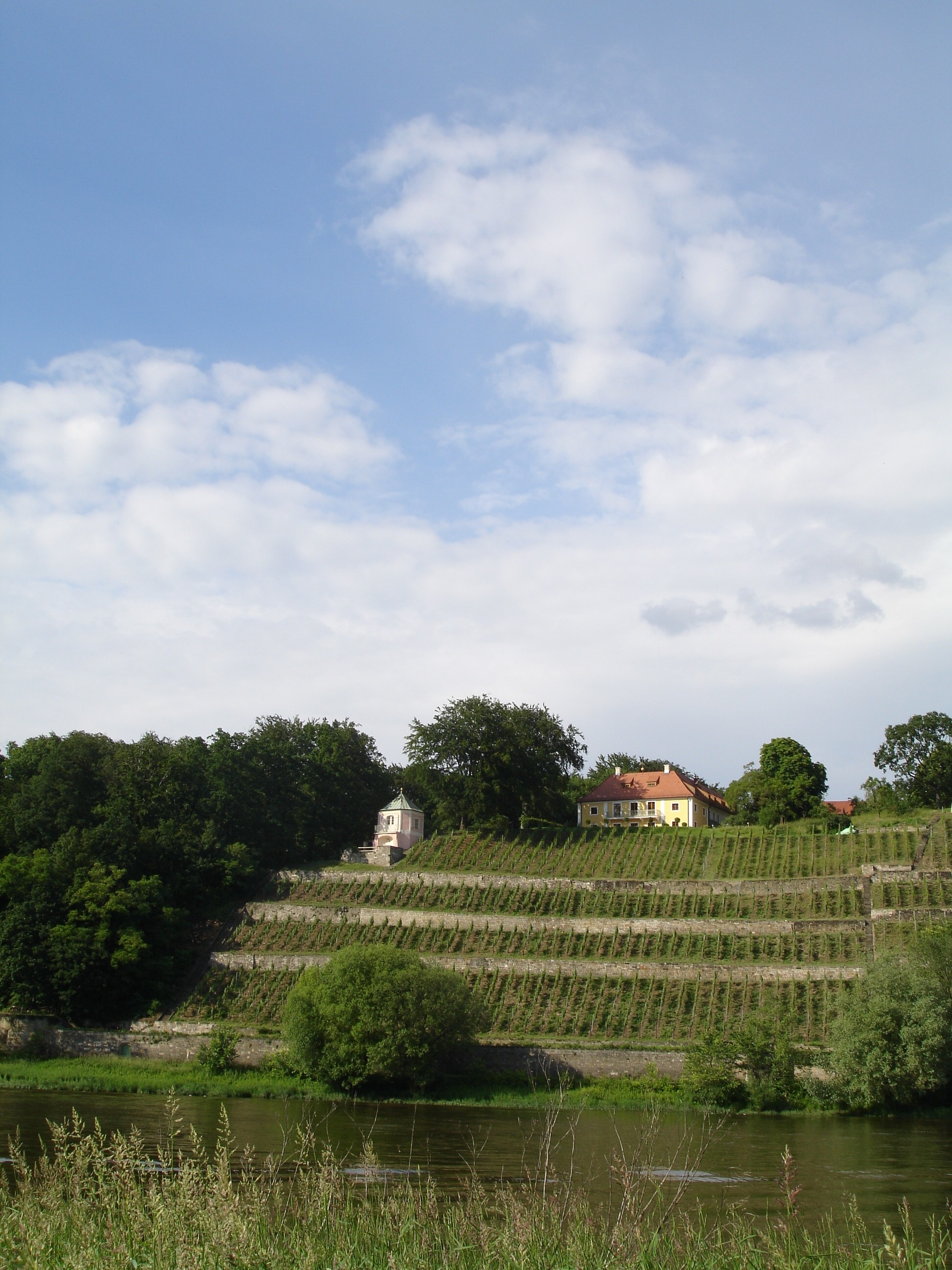 Dinglingers Weinberg mit dem barocken Häuschen und Pavillon an den Loschwitzer Elbhängen.